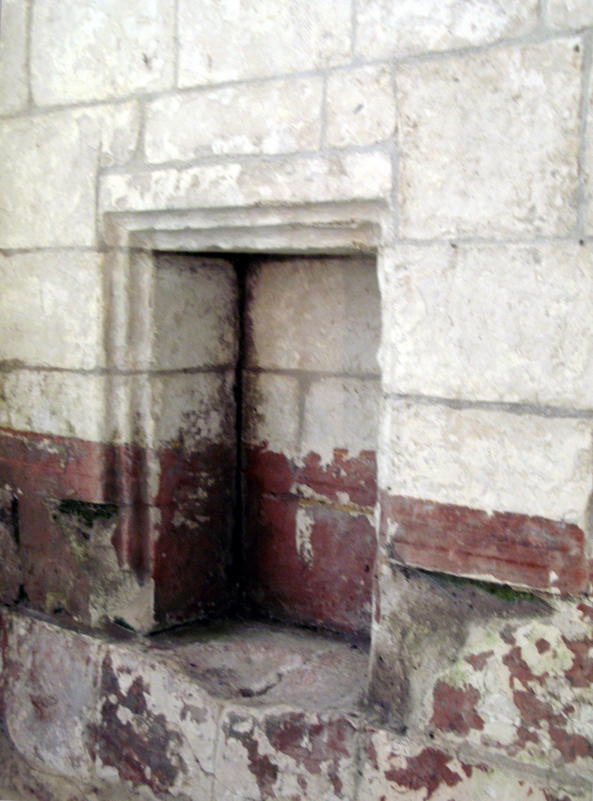 Fieffes-Montrelet (Somme, France) - Une des 2 «piscines» de l'église.